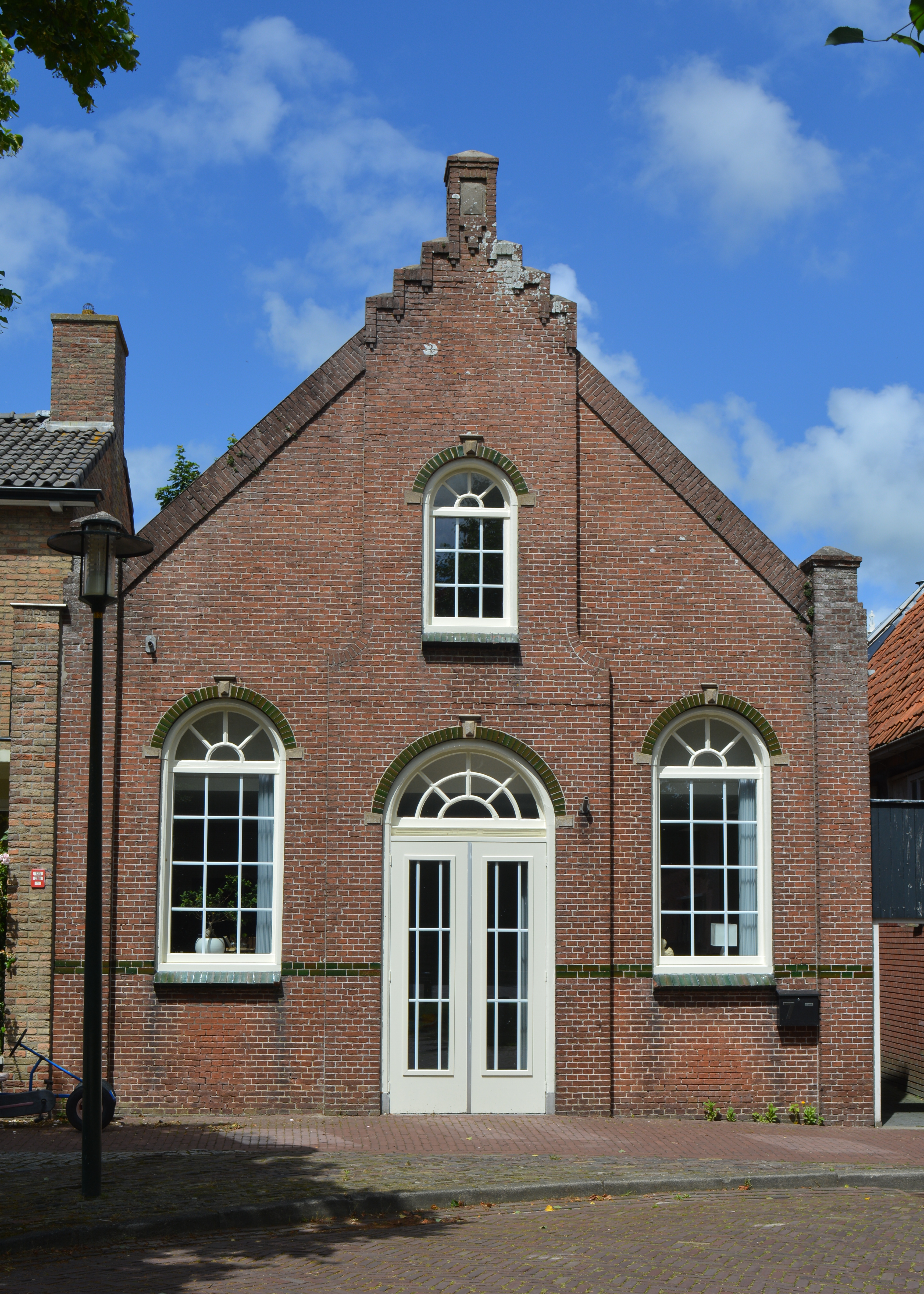 Rinsumageest, Voormalige gereformeerde kerk uit 1888